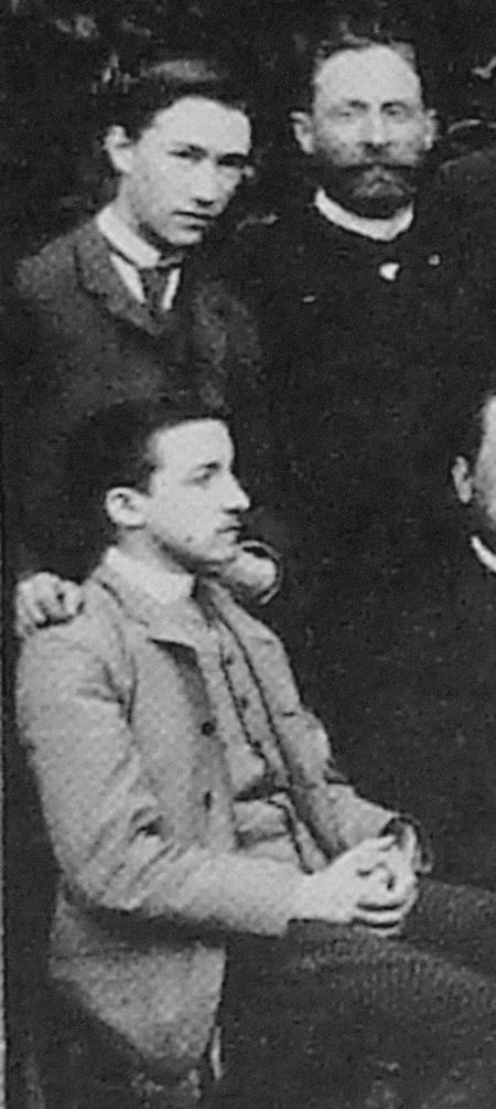 André Gide et Pierre Louÿs (détail) à l'école Alsacienne (Paris, 6e arrond.), année scolaire 1887-1888. Photographe Jules David. Collection particulière.